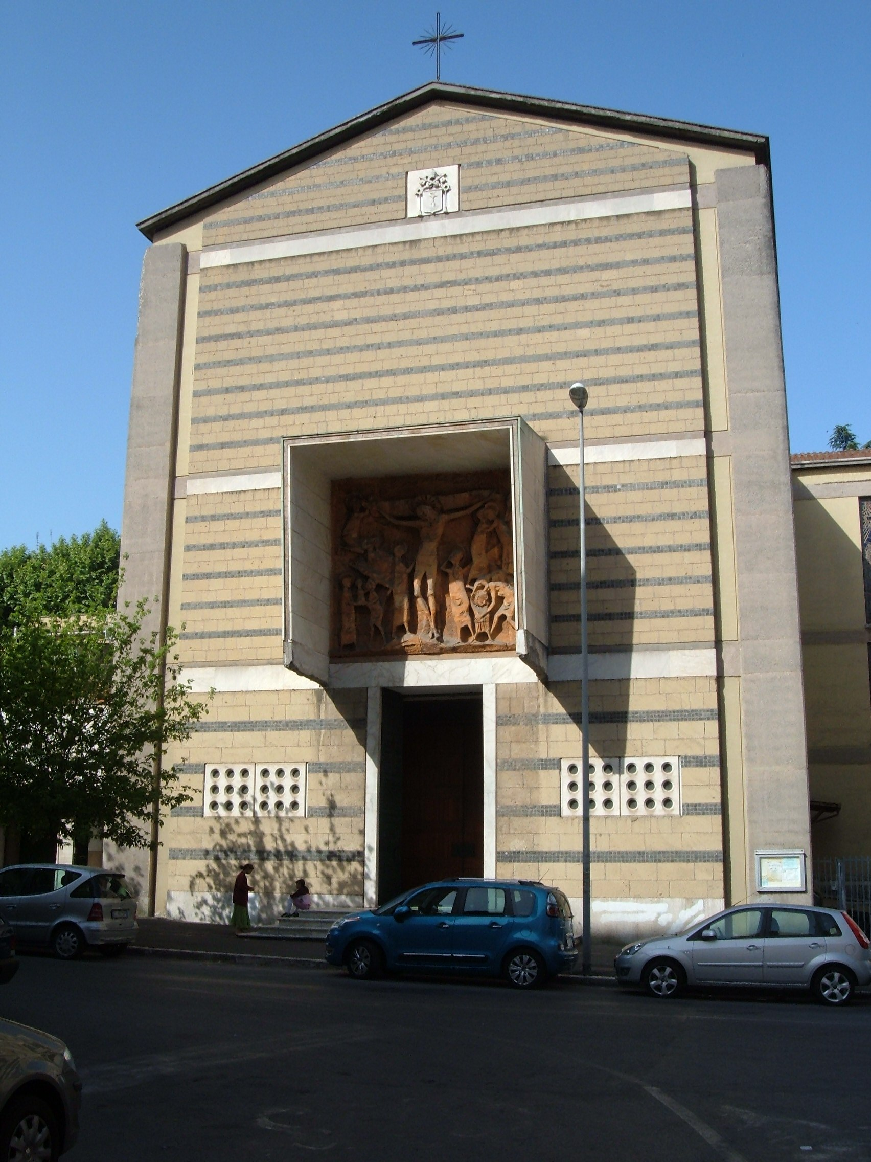 Chiesa dei Sacri Cuori di Gesù e Maria, a Roma, nel quartiere Trieste.